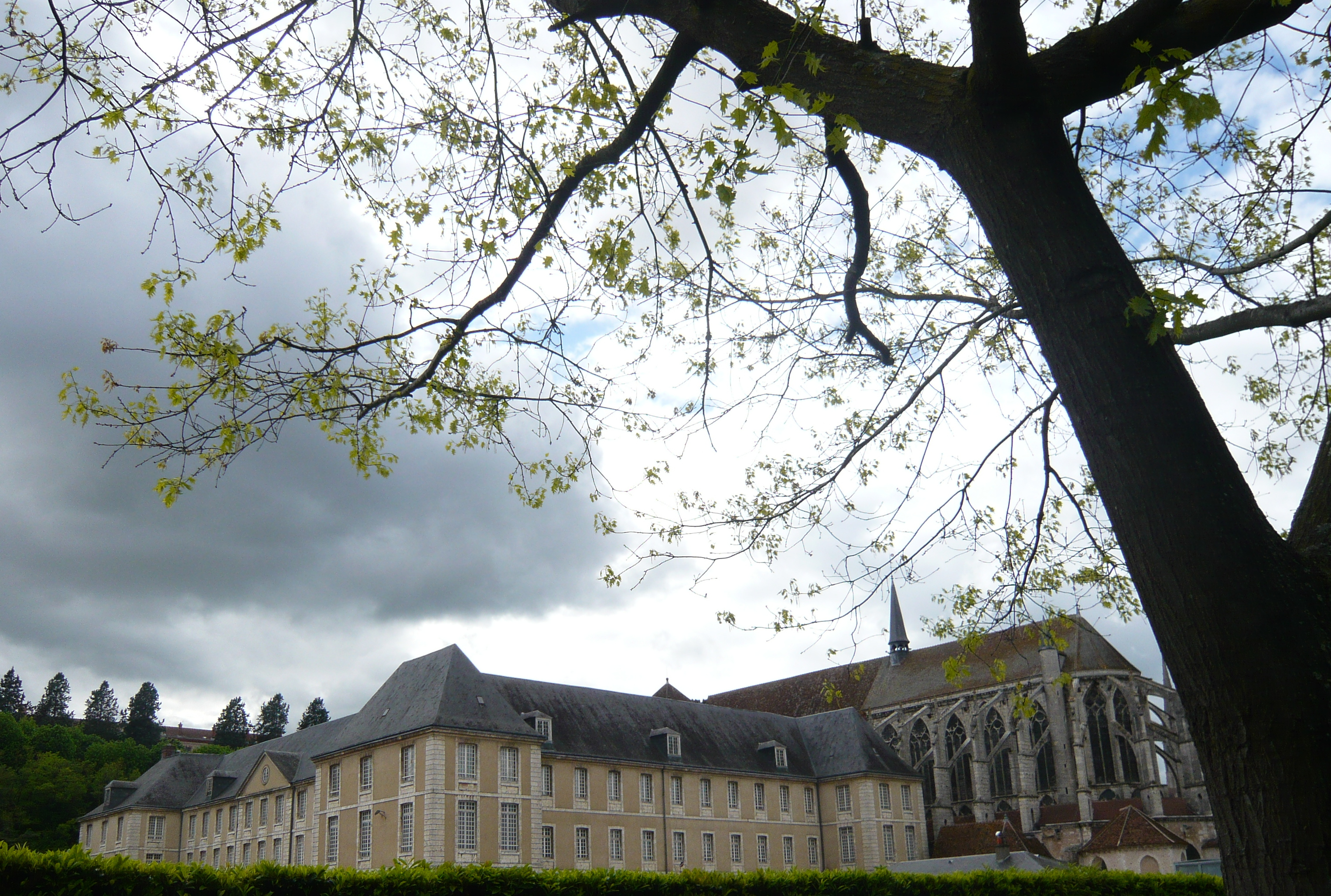 Abbaye de Saint-Père-en-Vallée, actuelle annexe du lycée Marceau, Chartres, Eure-et-Loir (France ). En arrière-plan, l'église Saint-Pierre.